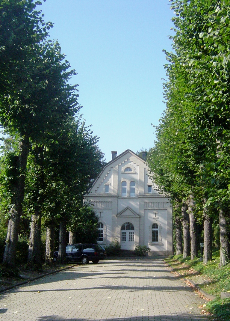 Niederländisch reformierte Kirche in Wuppertal